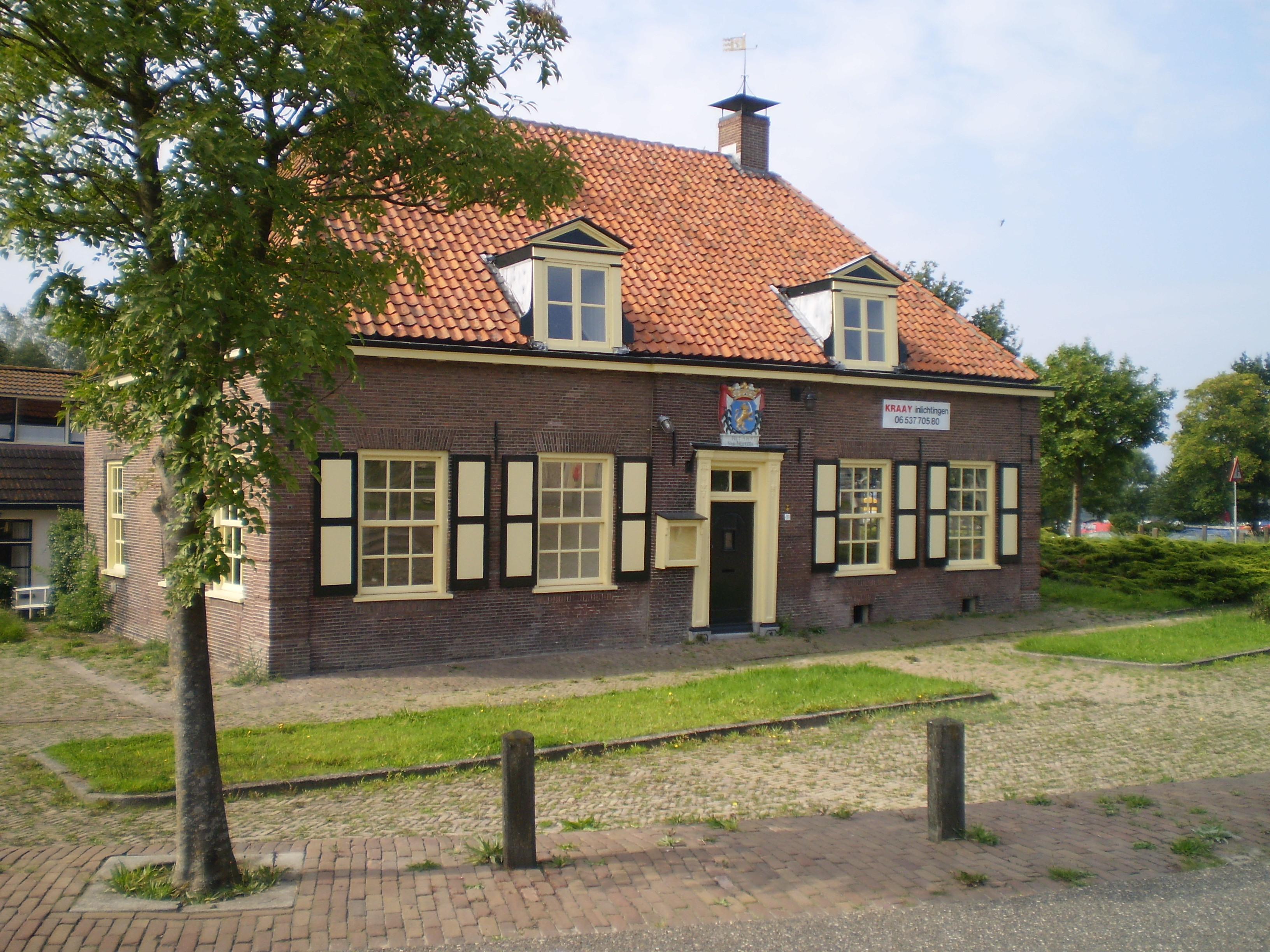 Ampt fan Nijkerk.